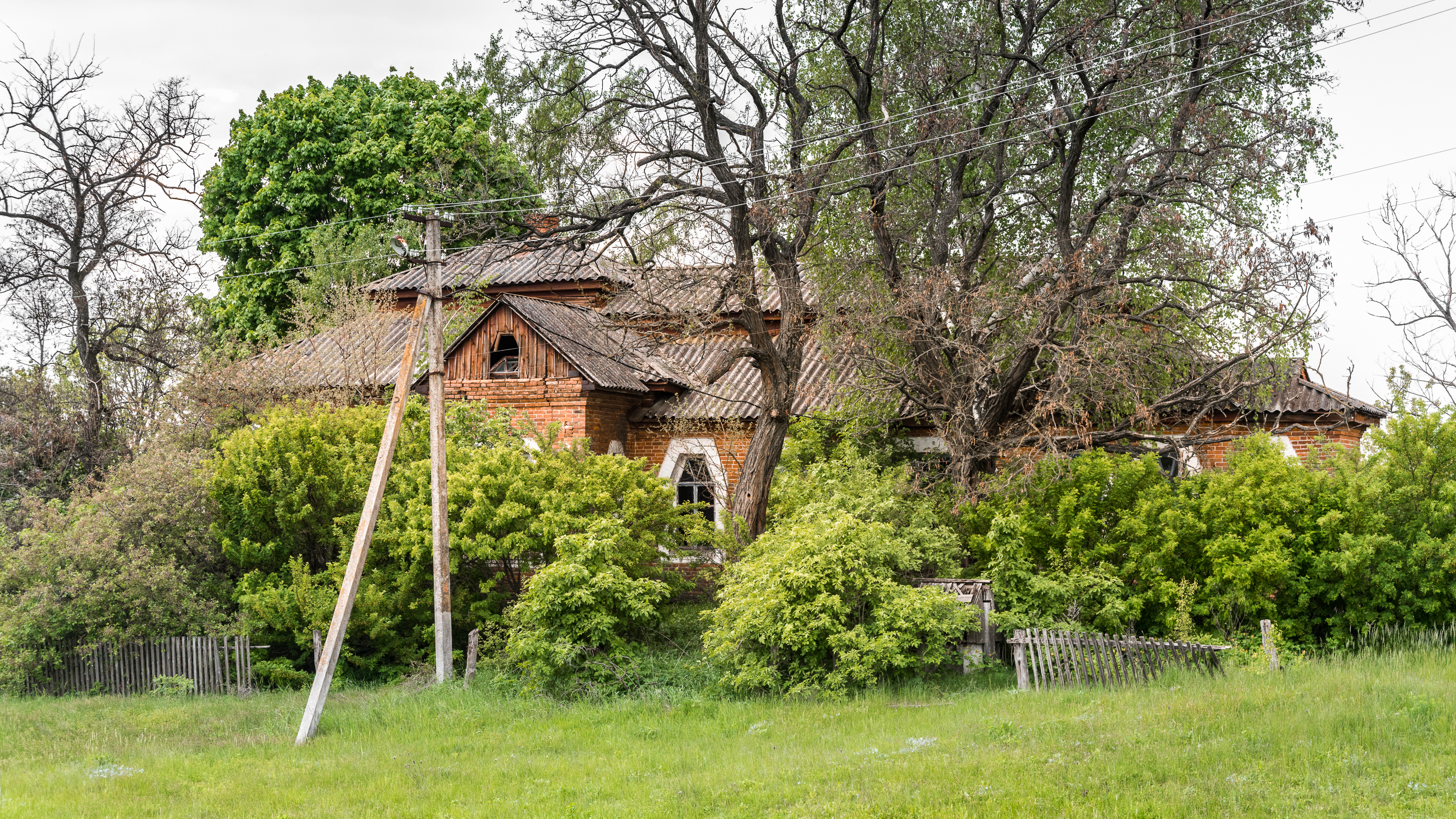 Земська школа в селі Христанівка. Зведена в 1913 році за проектом архітектора Опанаса Георгійовича Сластіона. Є однією з багатьох збережених шкіл Лохвицького земства.